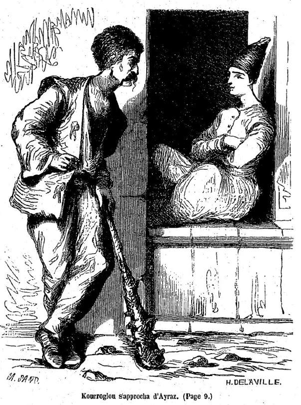 Illustrations de Maurice Sand pour "Kourroglou" de George Sand, dans sa réédition incluse dans les "Œuvres illustrées de George Sand" parues à Paris chez Hetzel, volume 5, 1853 ("Kourroglou" est l'avant-dernier texte du volume 5). Illustration figurant en page 16. (Attention : dans les volumes des "Œuvres illustrées de George Sand", la pagination recommence à 1 au début de chaque texte inclus dans un volume.)